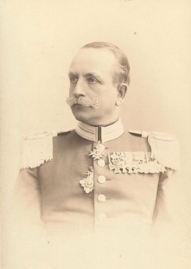 Porträtfotografie von Conrad von Schubert (1847-1924)